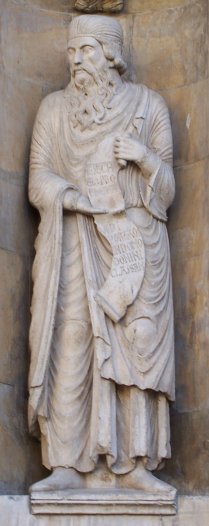 Duomo di Fidenza (provincia di Parma, Italy): statua del profeta Ezechiele, opera di Benedetto Antelami, situato nella facciata esterna della cattedrale. XII secolo.